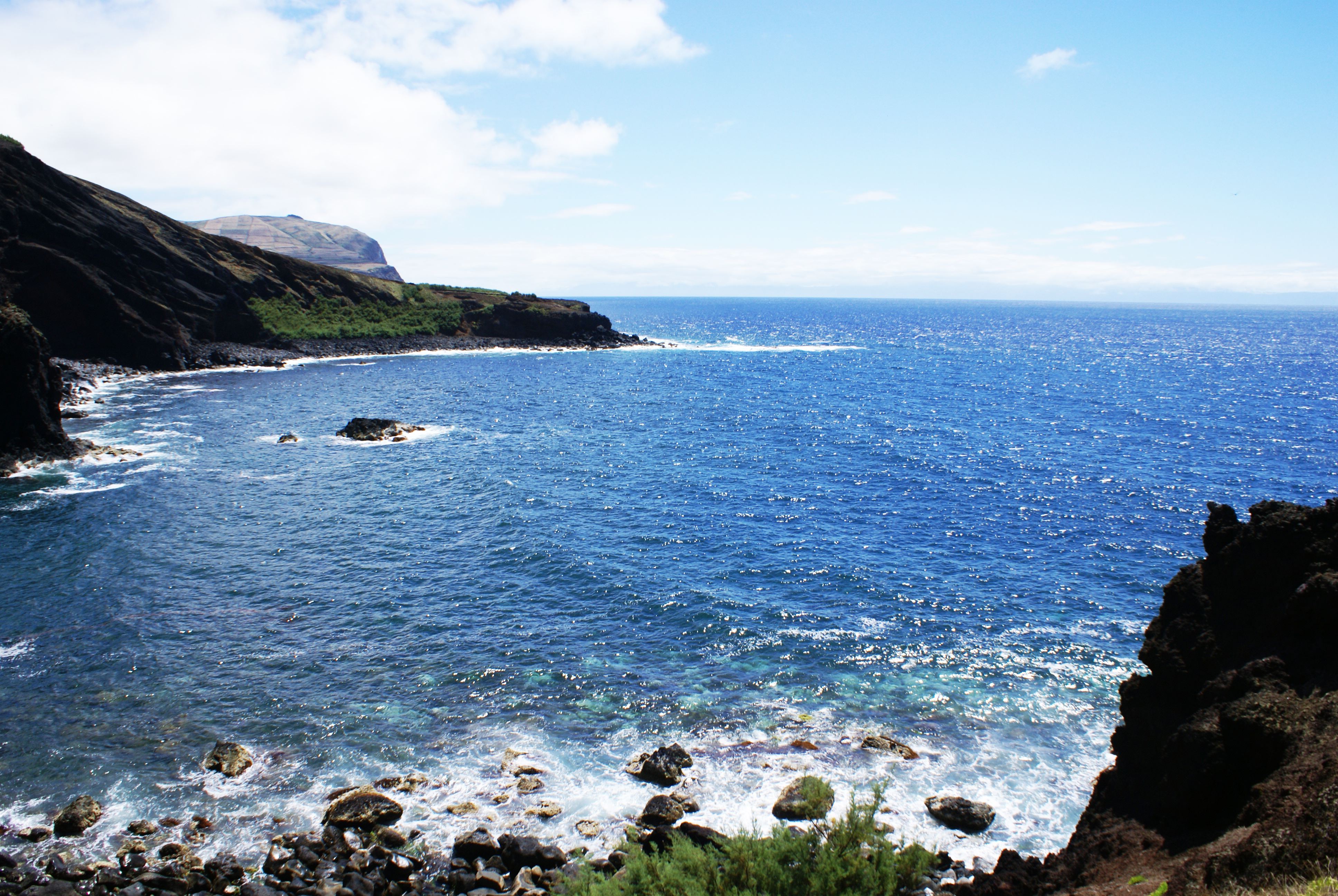 Porto Afonso, Baía, Santa Cruz da Graciosa, ilha Graciosa, Açores, Portugal